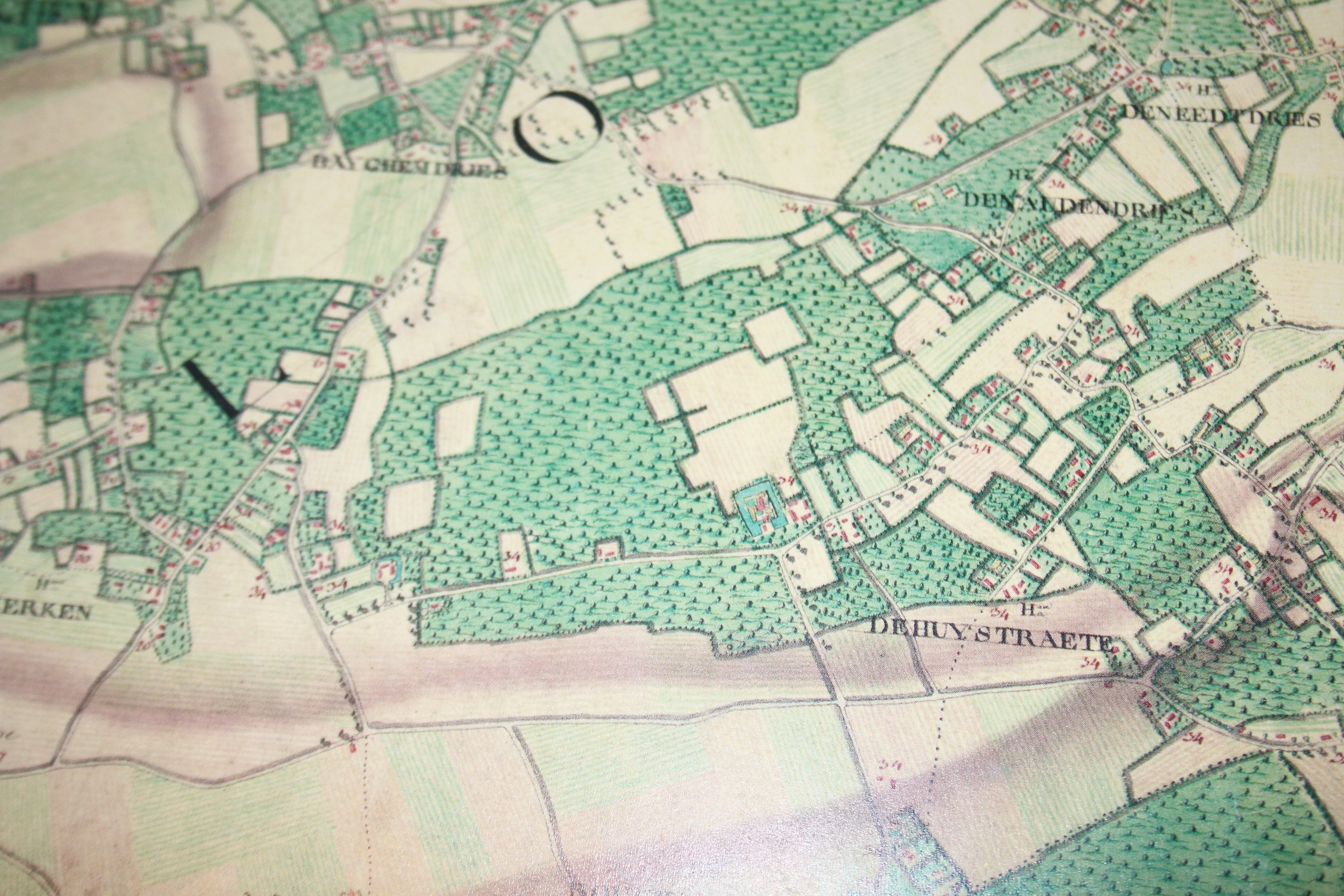 Blauw Kasteel, Lange Munte, Ferrariskaart